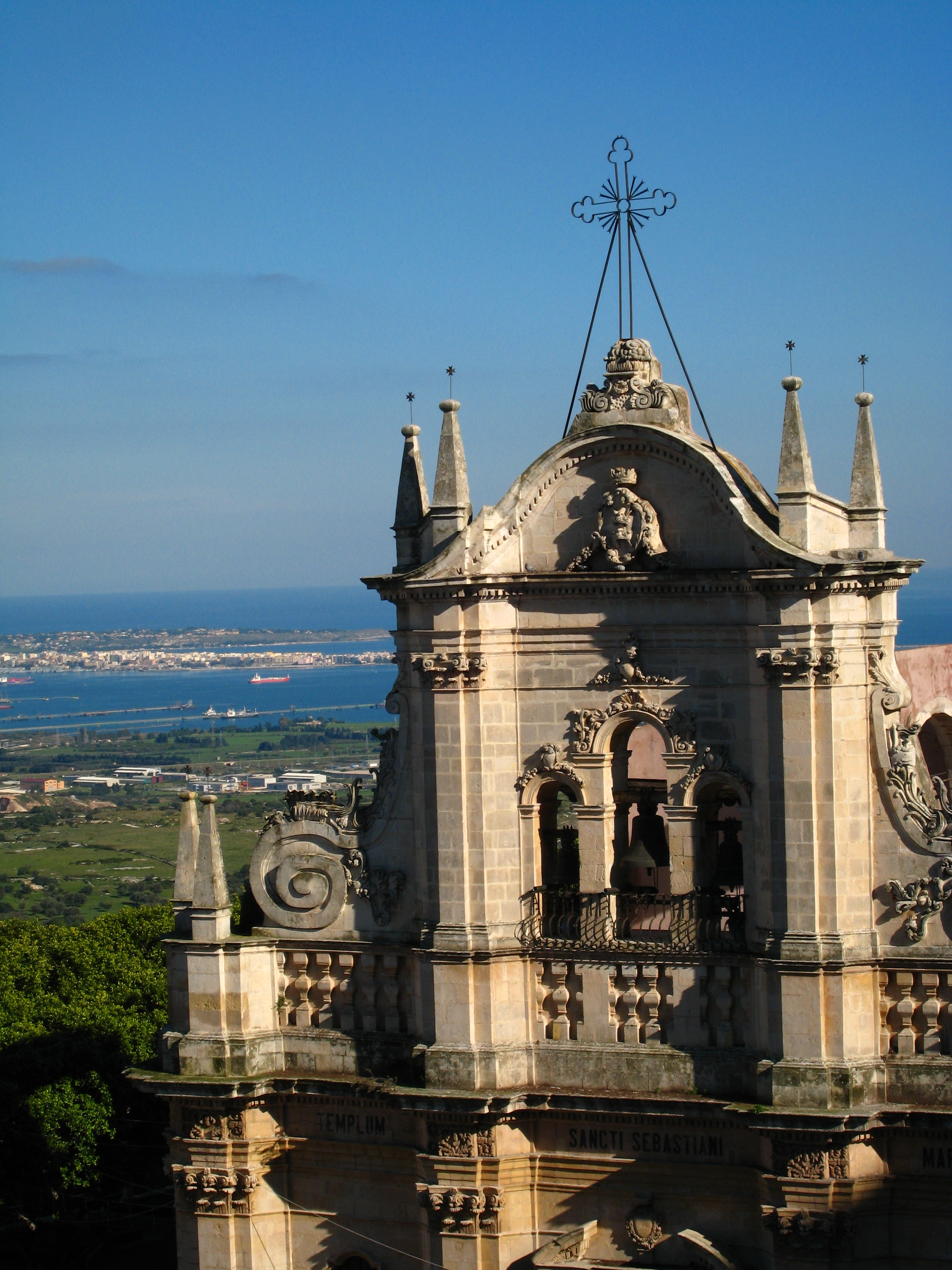 La Cattedrale di Melilli